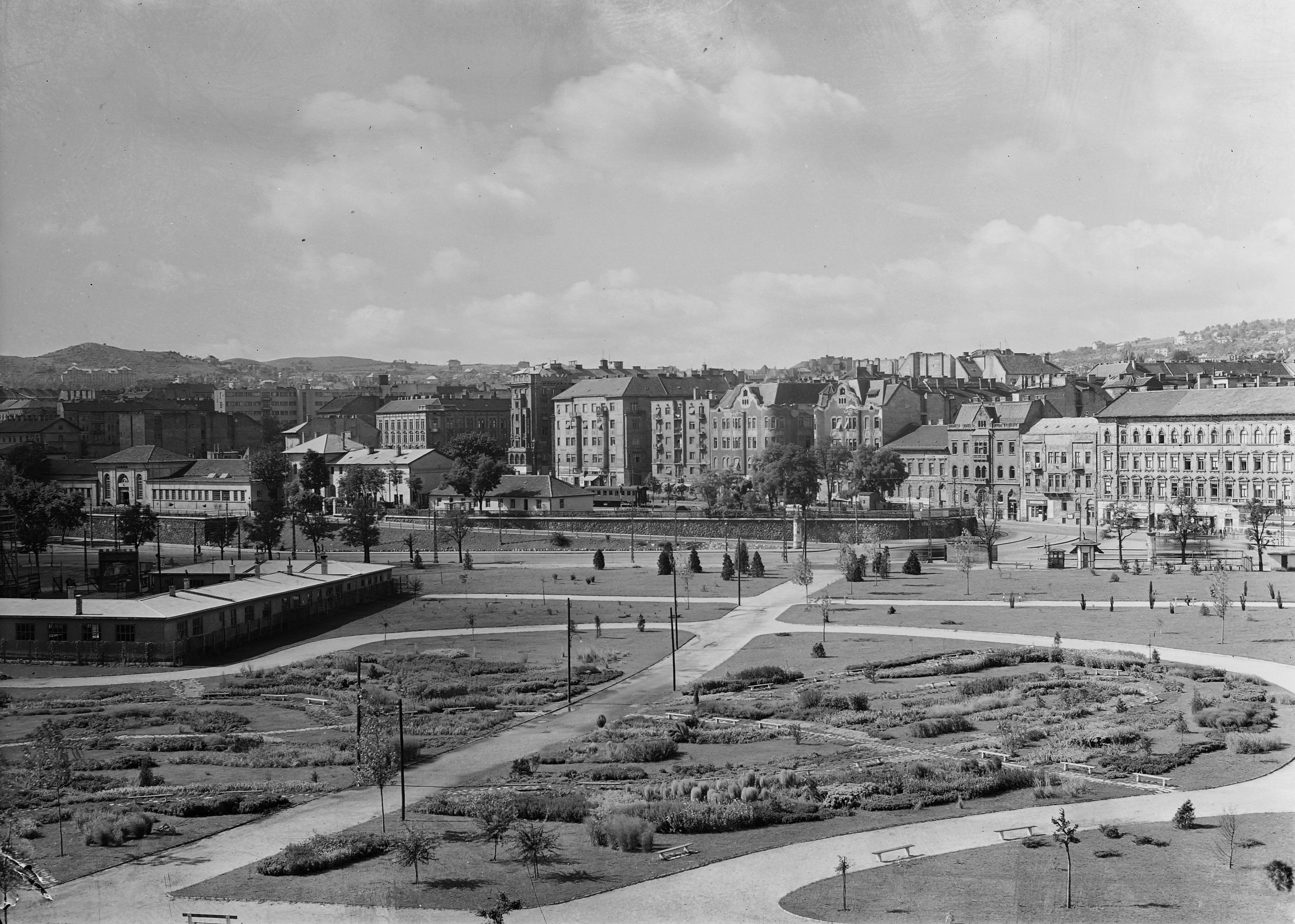 Vérmező, háttérben a Déli pályaudvar és az Alkotás utca házai. Location: Hungary, Budapest I. Tags: railway, view, Budapest Title: Vérmező, háttérben a Déli pályaudvar és az Alkotás utca házai.